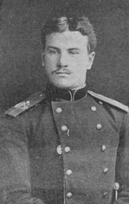 Nikolaj Michajlovič Rogačëv (1856-1884)